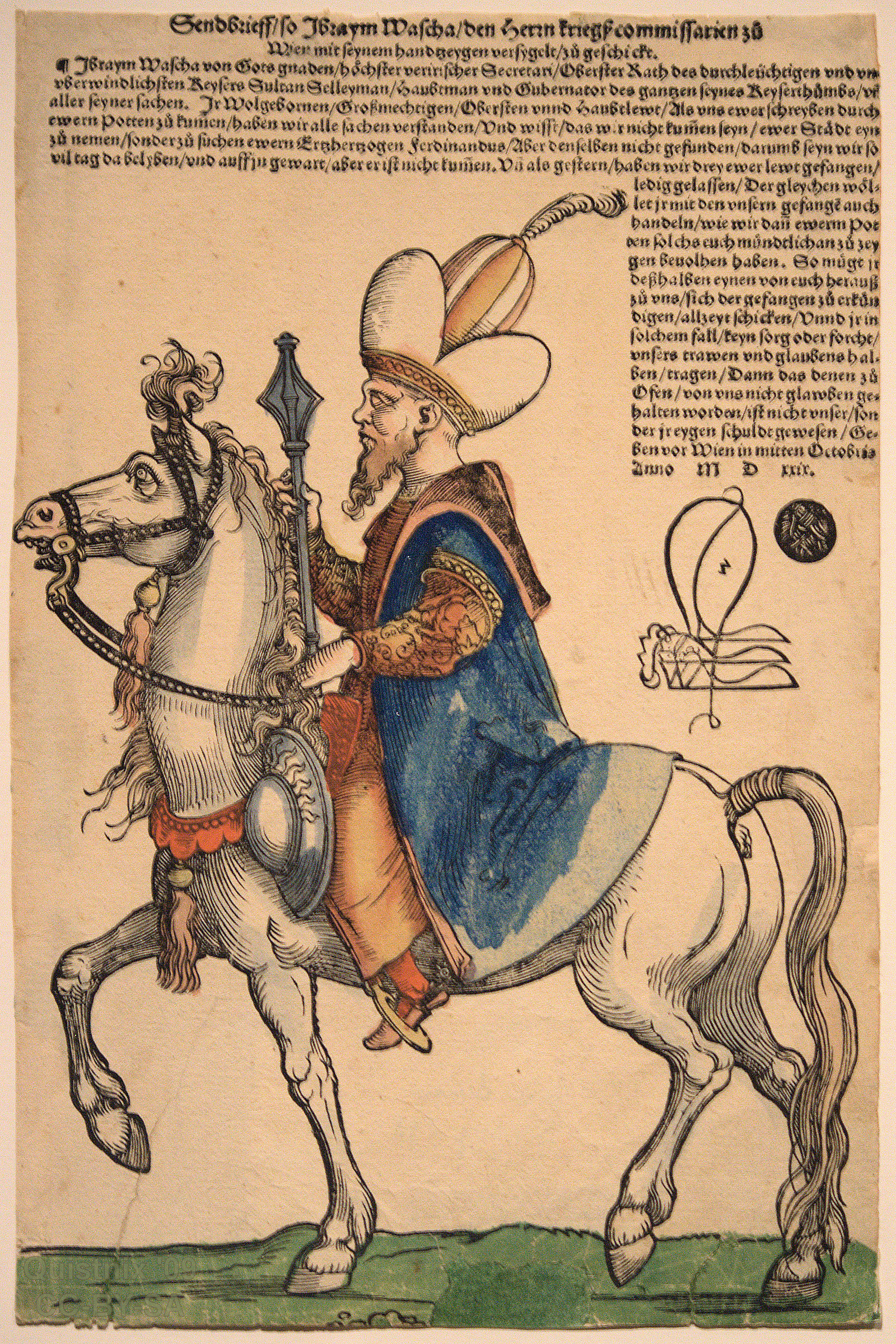 Pargali Damat Ibrahim Pascha, riding a horse. Drawing by Hans Sebald Beham (abt. 1530). Original in Museum Boijmans van Beuningen, Rotterdam.